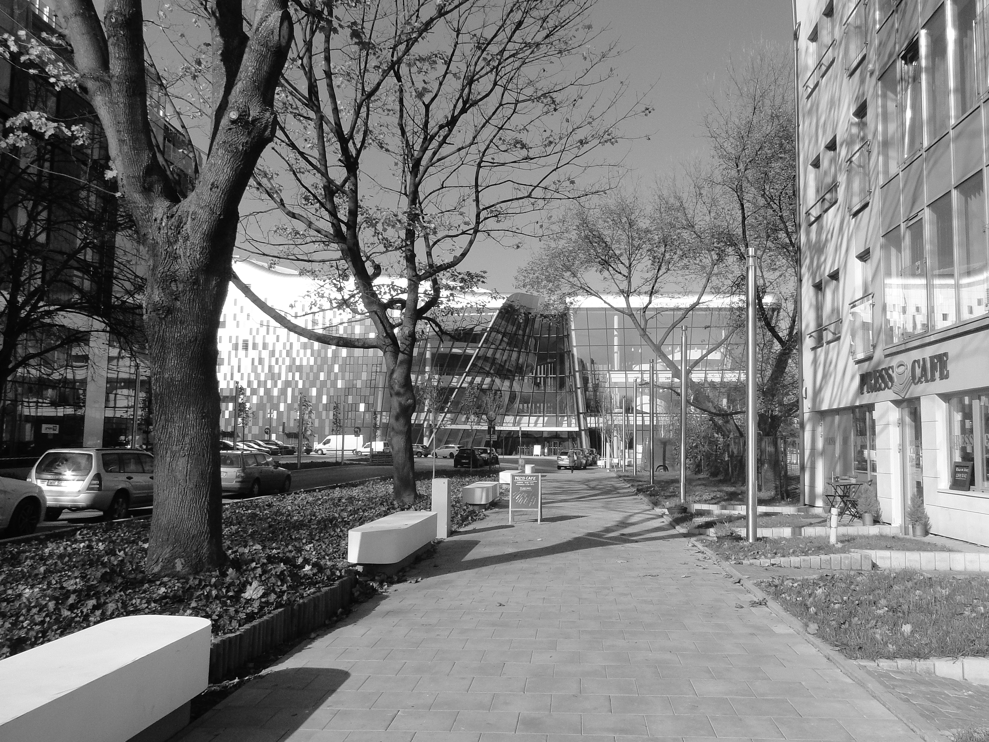 Ulica Barska w rejonie Centrum ICE Kraków